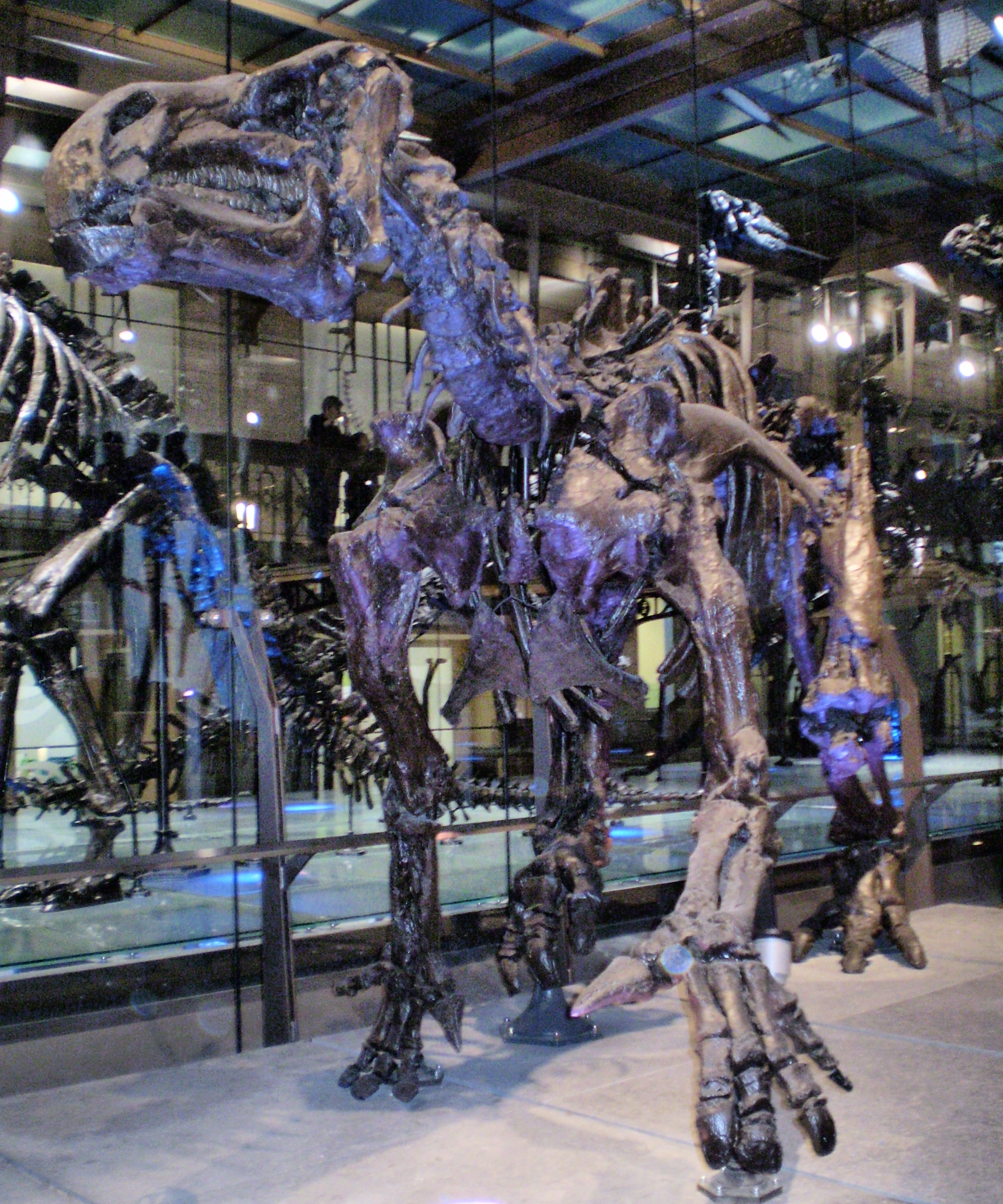 Iguanodon de Bernissart (Iguanodon bernissartensis) présenté en position quadrupède, Institut Royal des Sciences naturelles de Belgique, Bruxelles